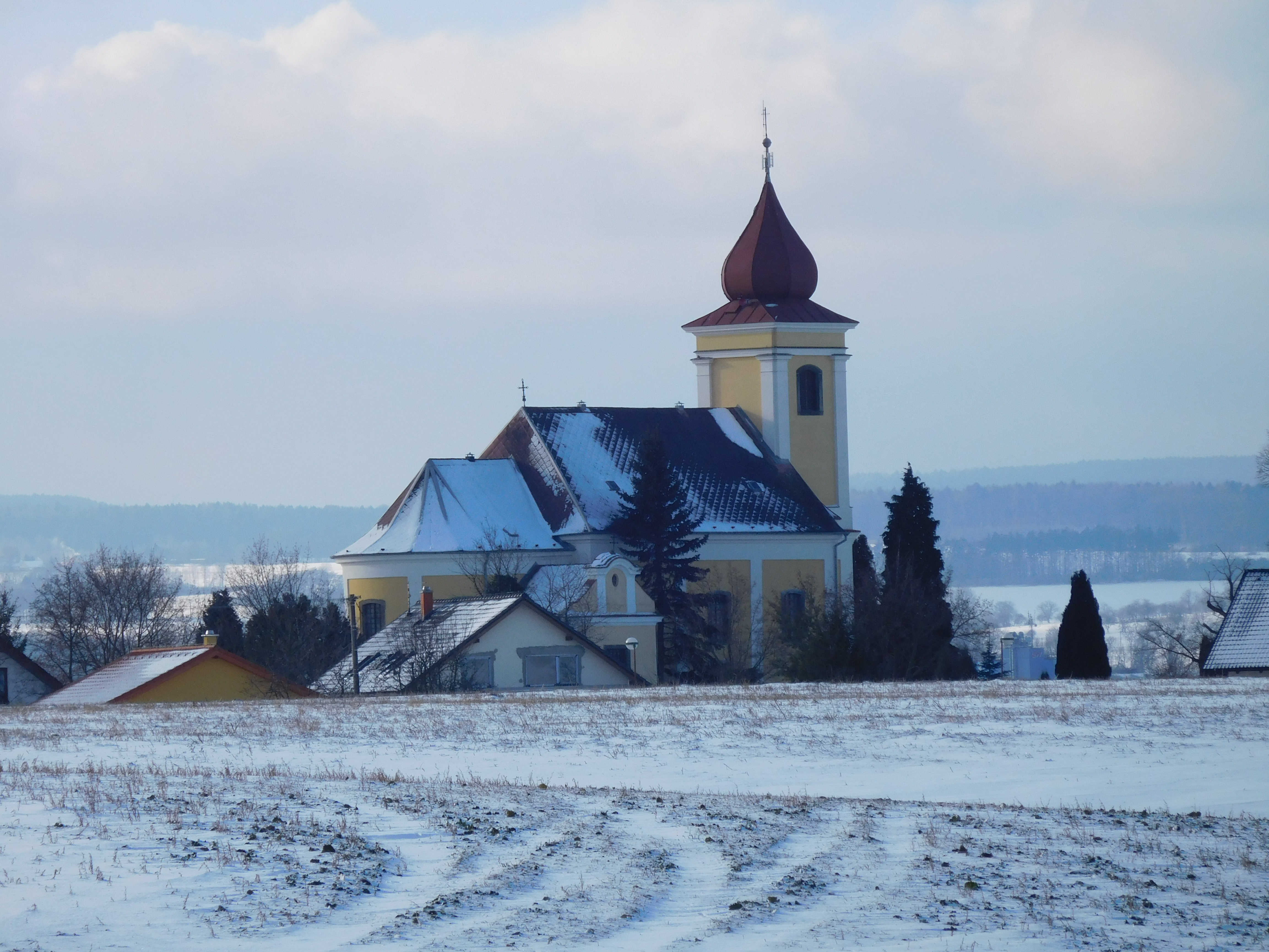 kostel sv. Marka v Markovicích